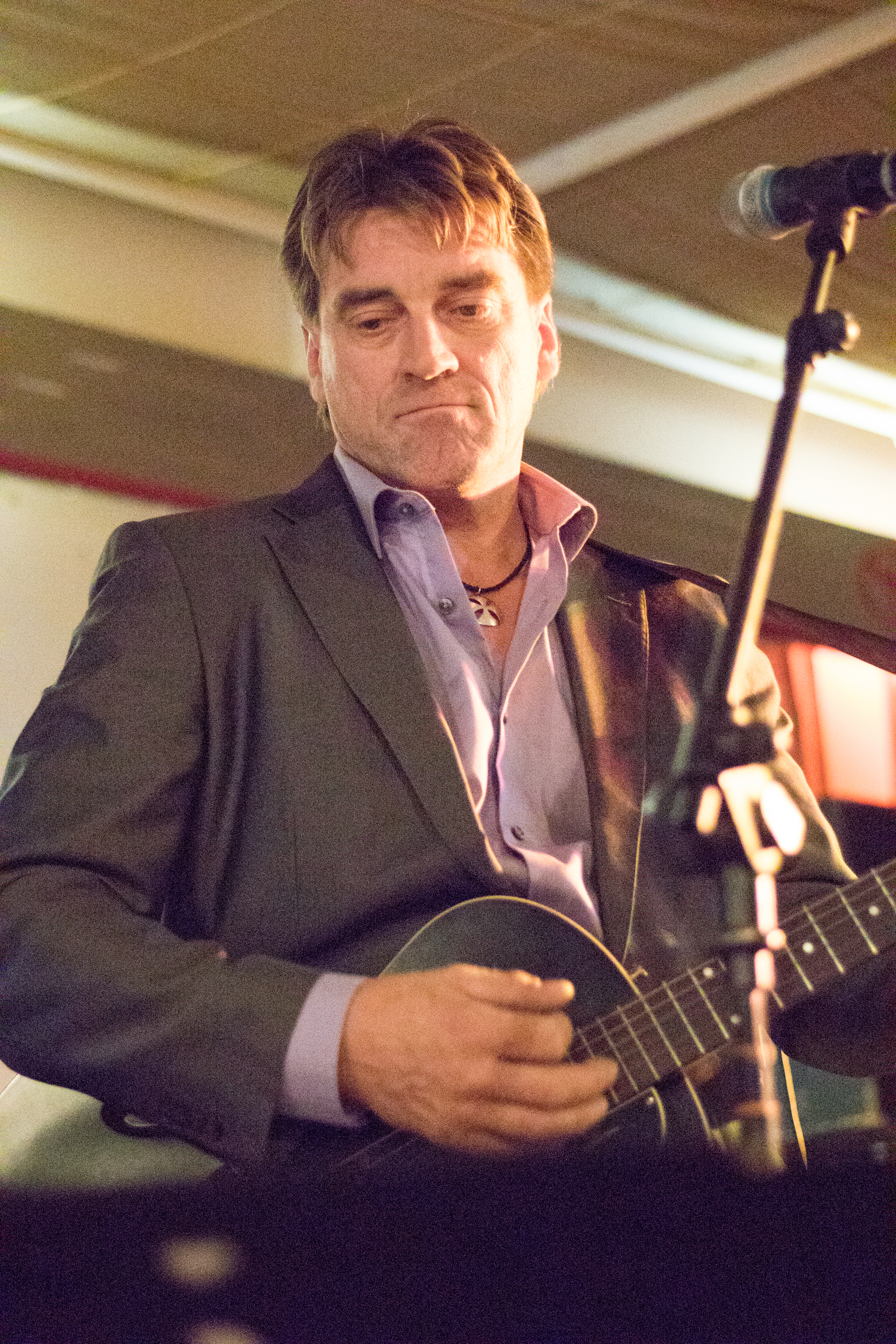 Kalle Jussila suomalainen laulaja